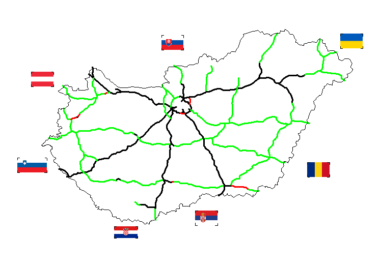 Das Autobahnnetz Ungarns am 04.2010, Fertig. Schwarz, Im Bau: Rot, Geplant: Grün